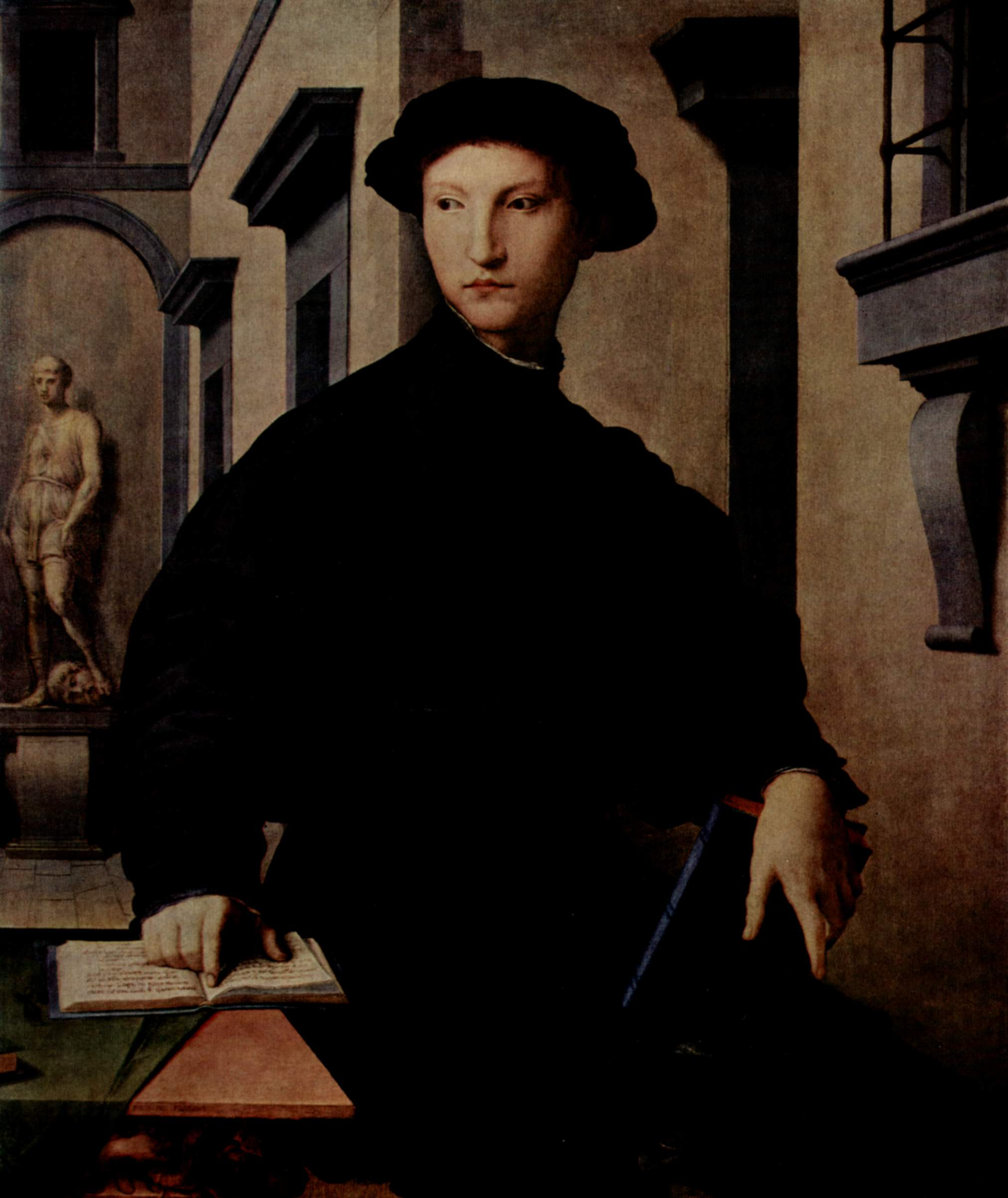 Porträt des Humanisten in seinem florentiner Palast, im Hintergrund: David von Donatello